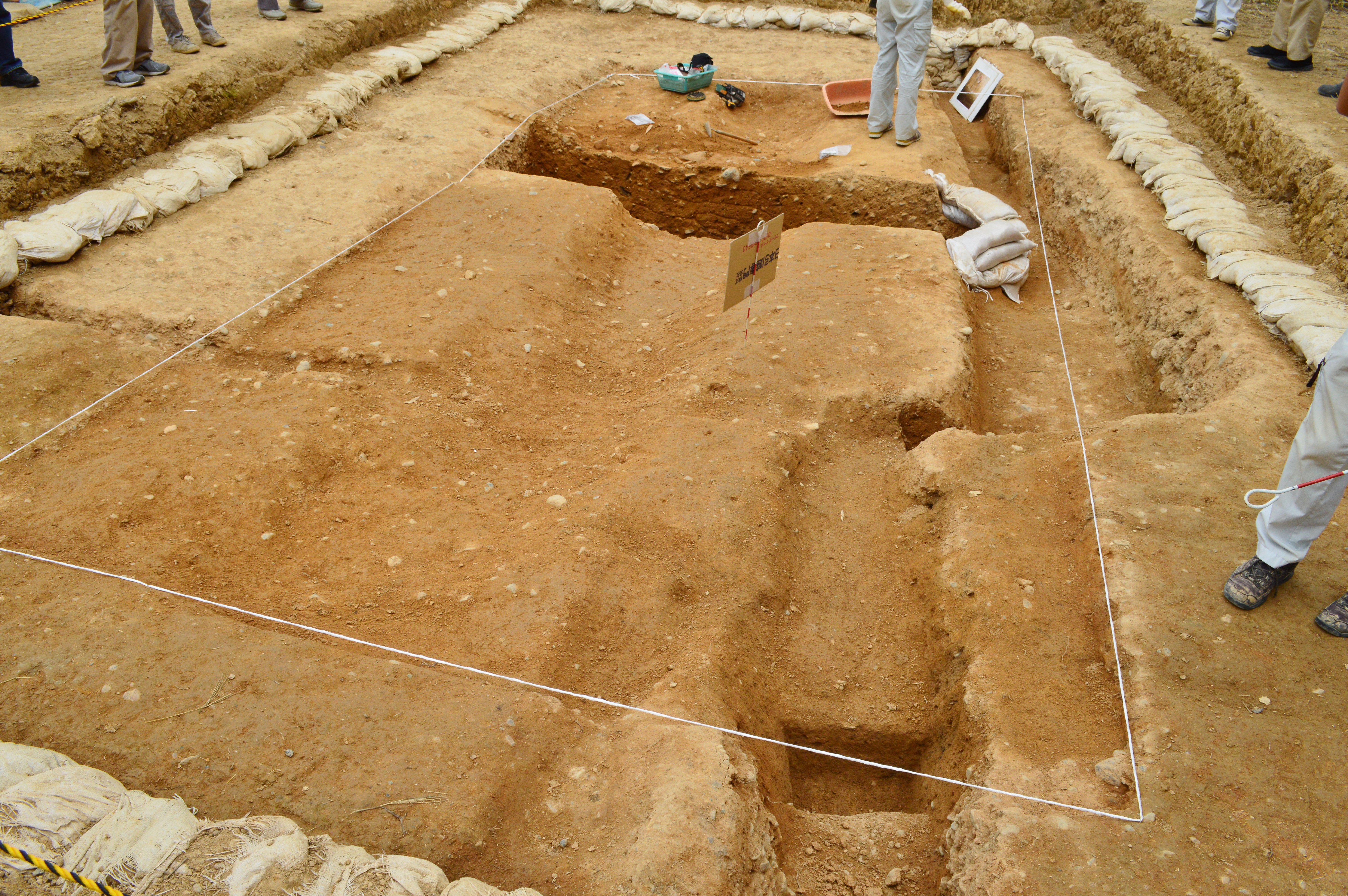 久津川車塚古墳 造出の墓坑